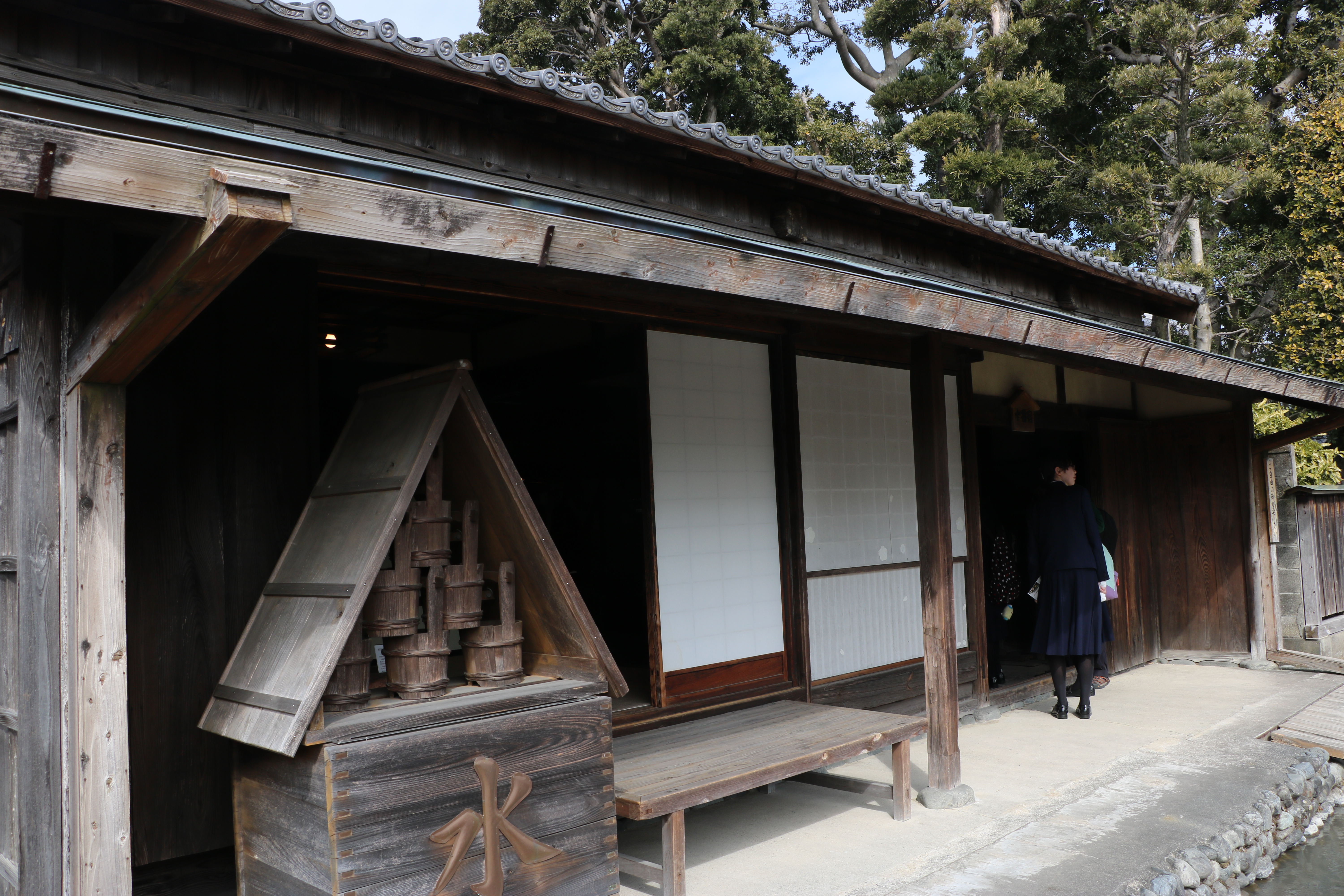 島田宿大井川川越遺跡。番宿（川越人足の待機、集合場所）